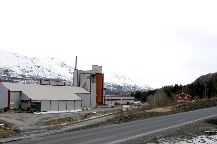 Nedlagt fabrikk på Nyland